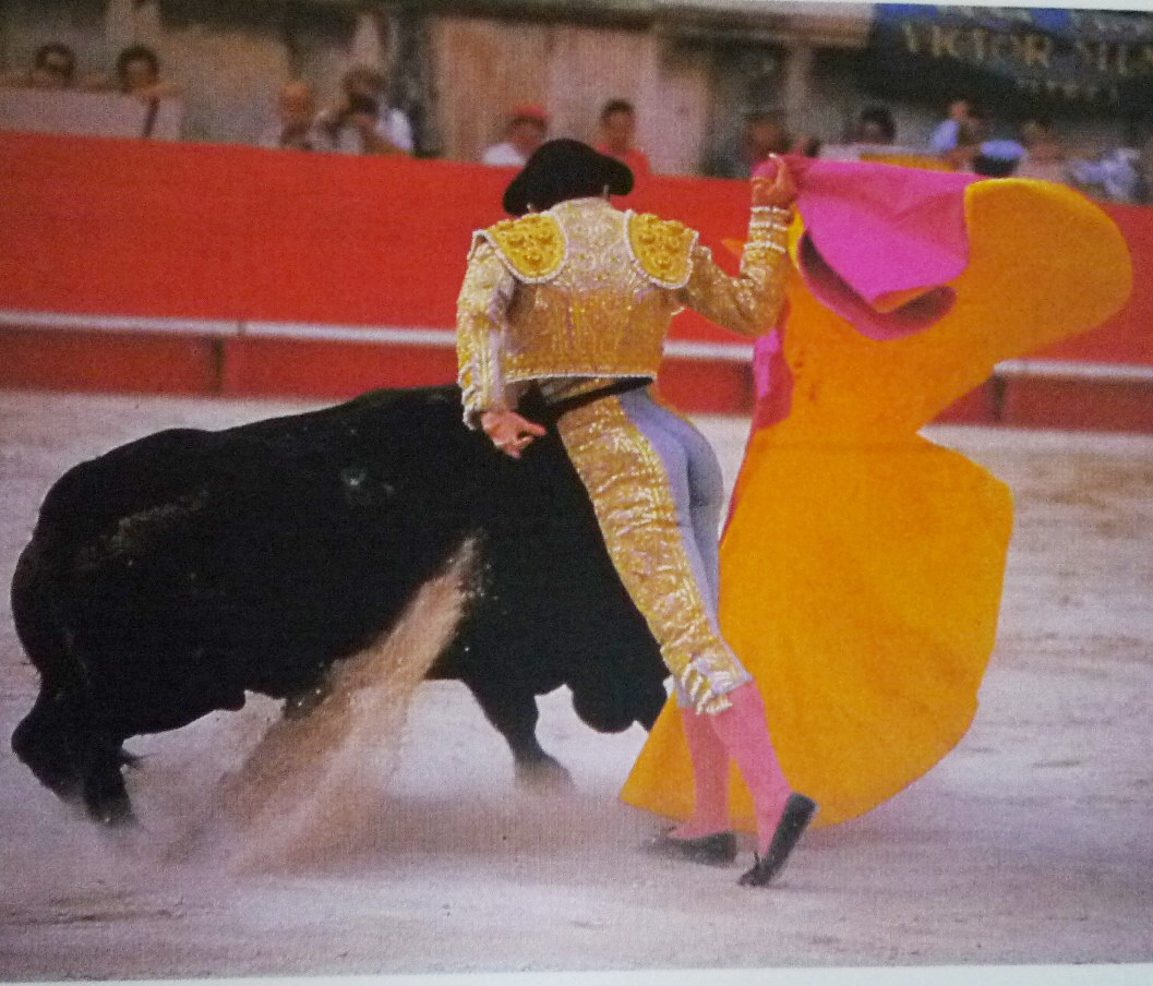 Larga3.JPG